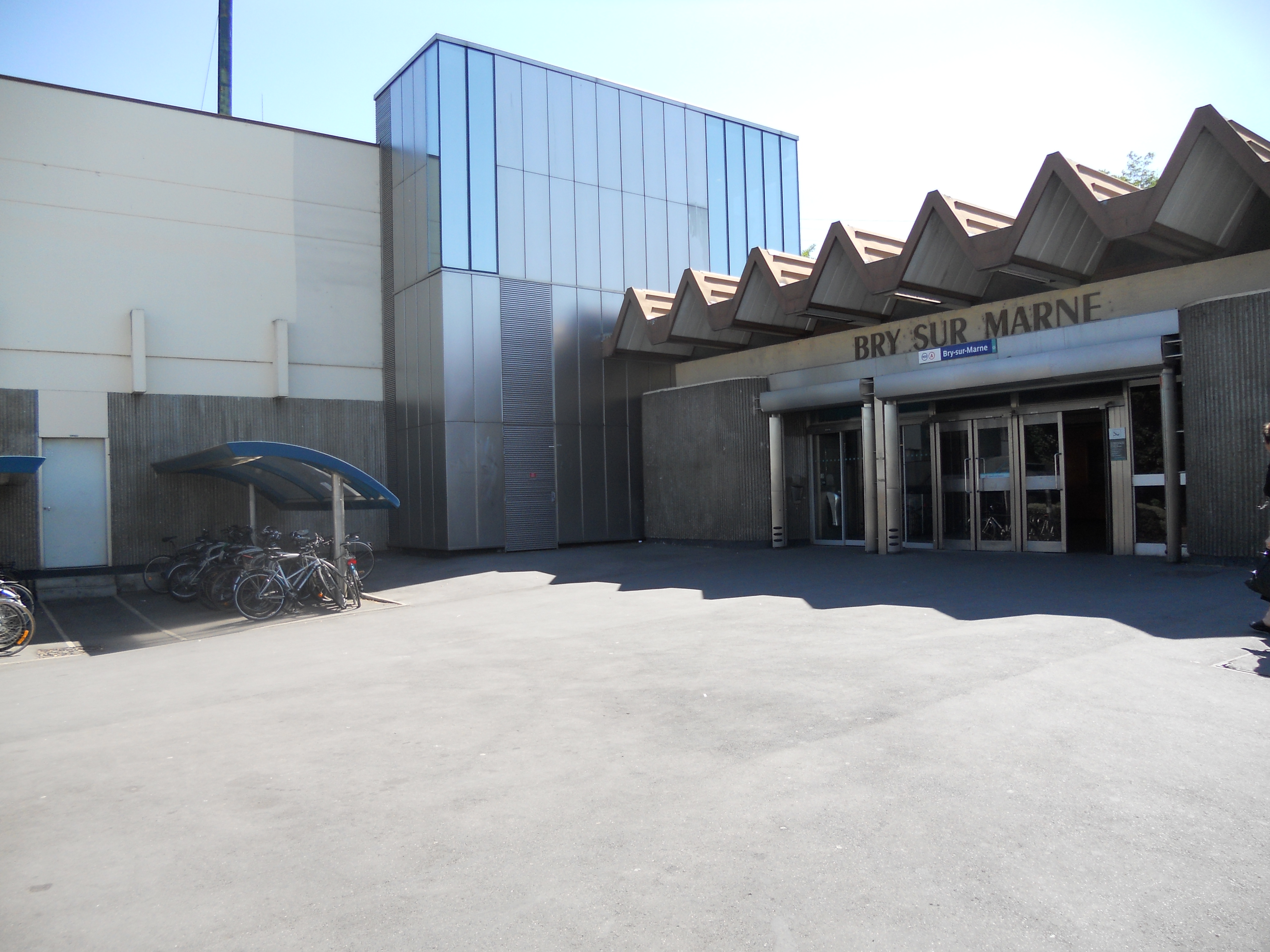 La gare de RER de Bry-sur-Marne (ligne A).